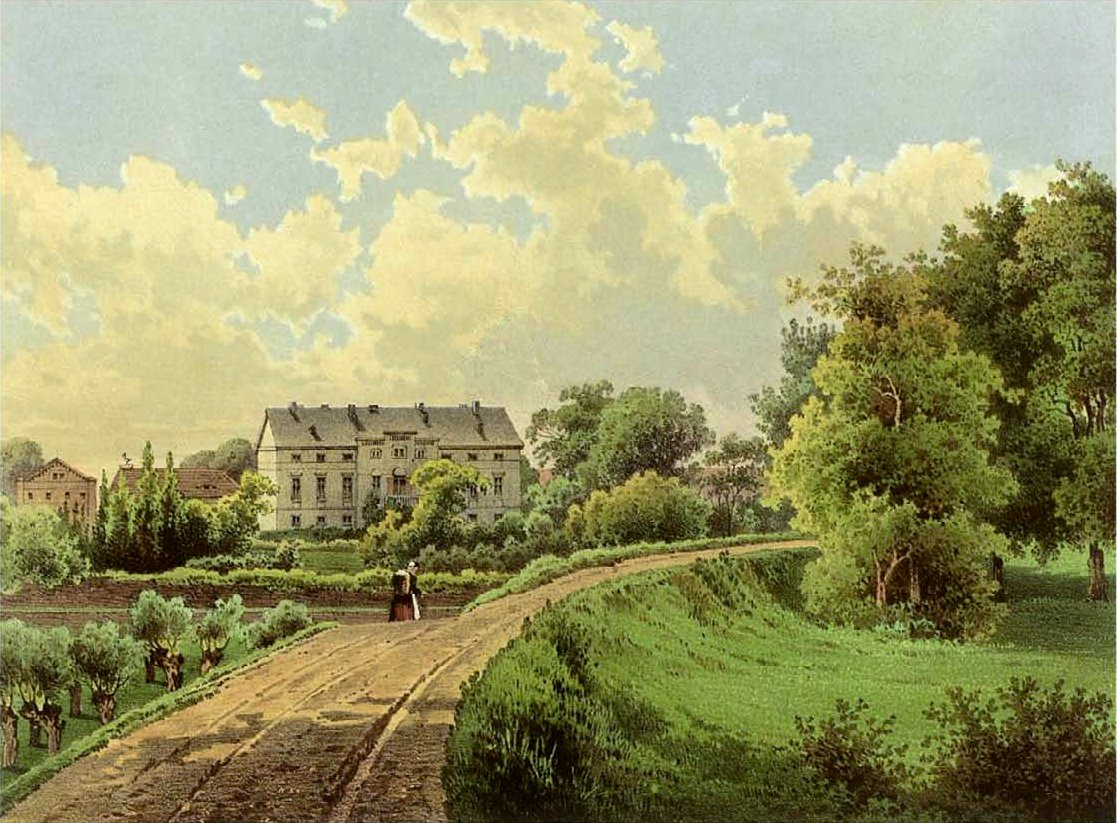 Rittergut Kannenberg, Kreis Osterburg, Provinz Brandenburg